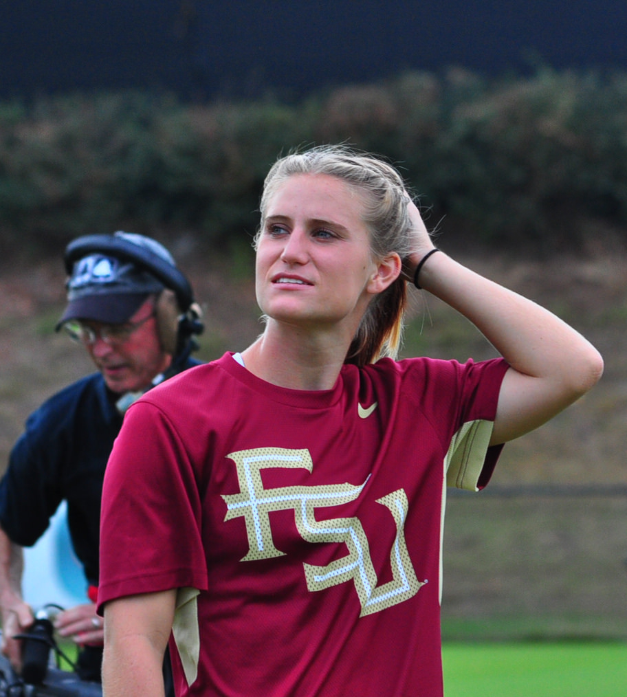 Michaela Hahn